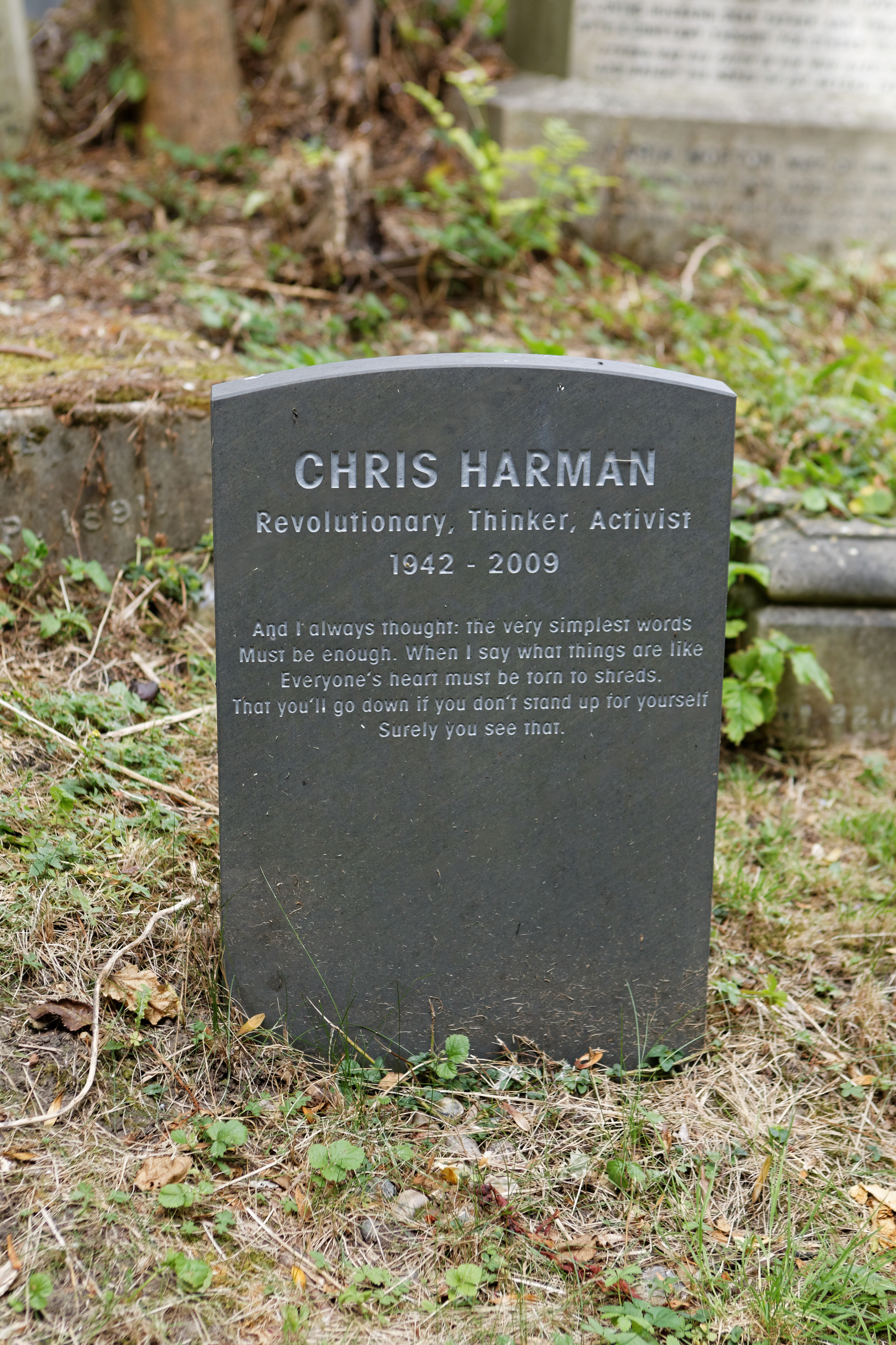 Sépulture de Chris Harman (1942-2009), militant révolutionnaire marxiste britannique.